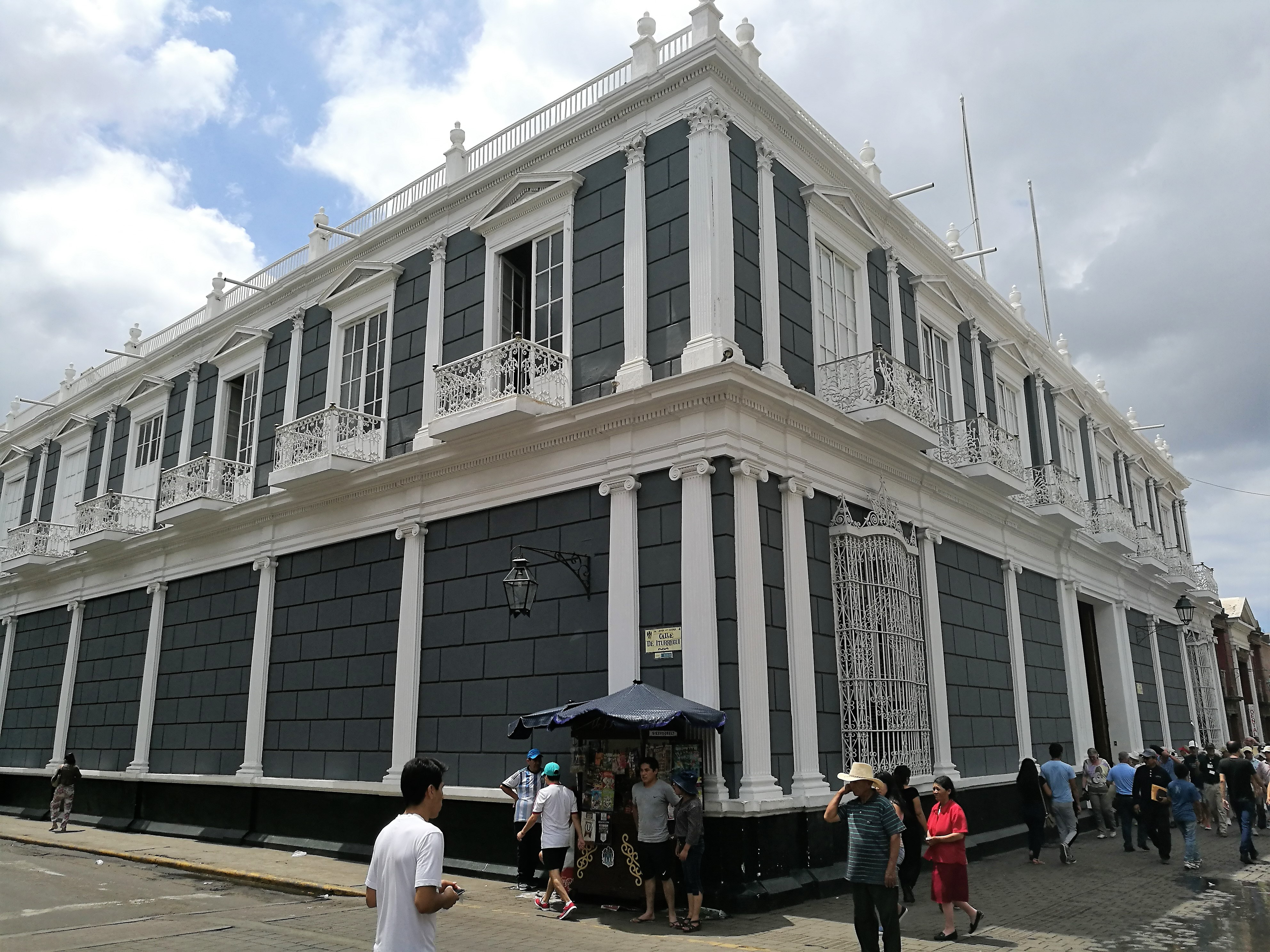 Edifici de la confluència entre el jirón Francisco Pizarro i el jirón Junín de Trujillo